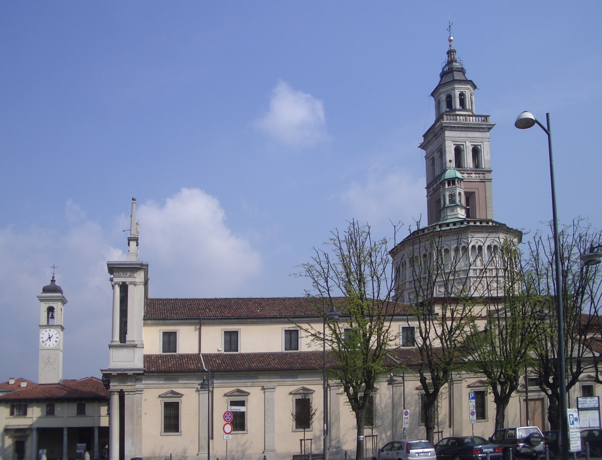 Santuario della Beata Vergine dei Miracoli, Saronno (Varese), Italy